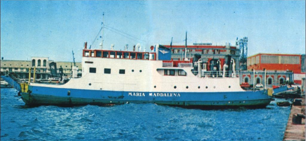 The ferry Maria Maddalena with NAVARMA's livery.